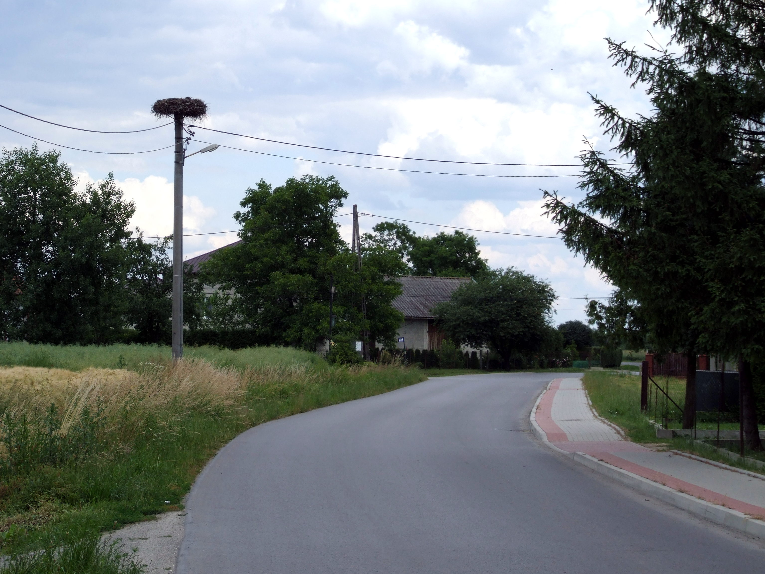 Głuchów - droga prowadzącą do Woli Dalszej i Dębiny